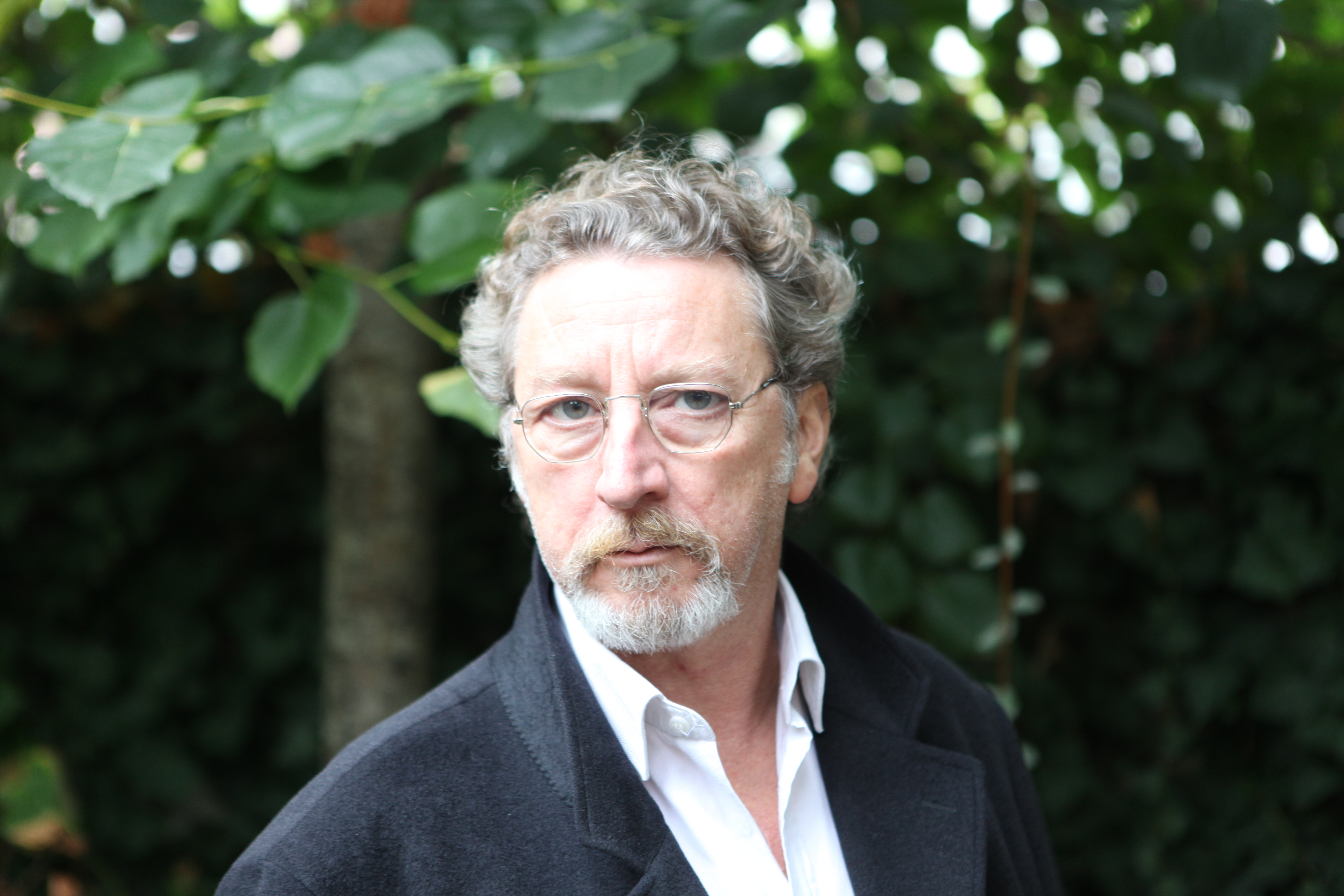 Par Valentine Guédiguian